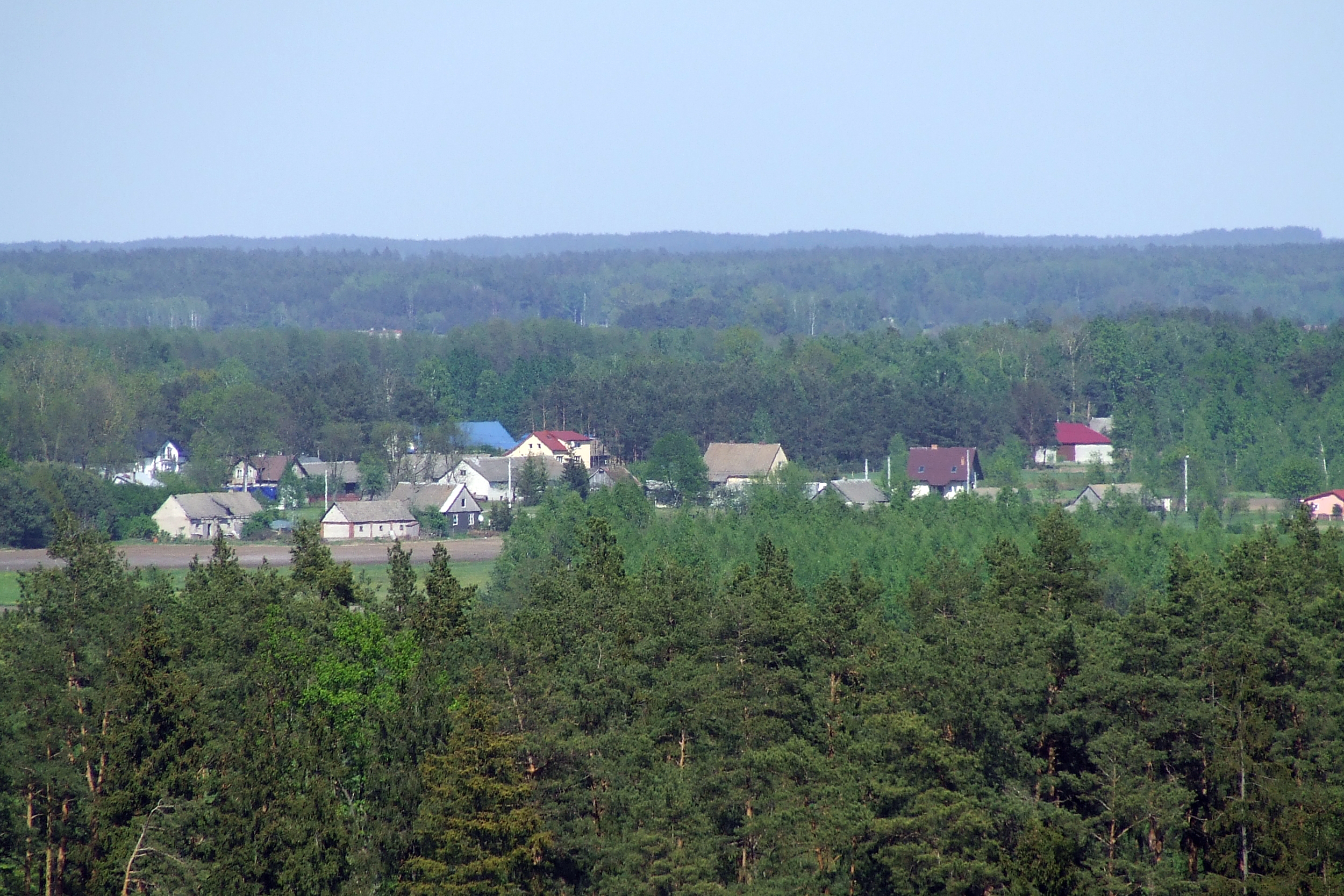 Wach - widok z dostrzegalni Wach-Podgórze